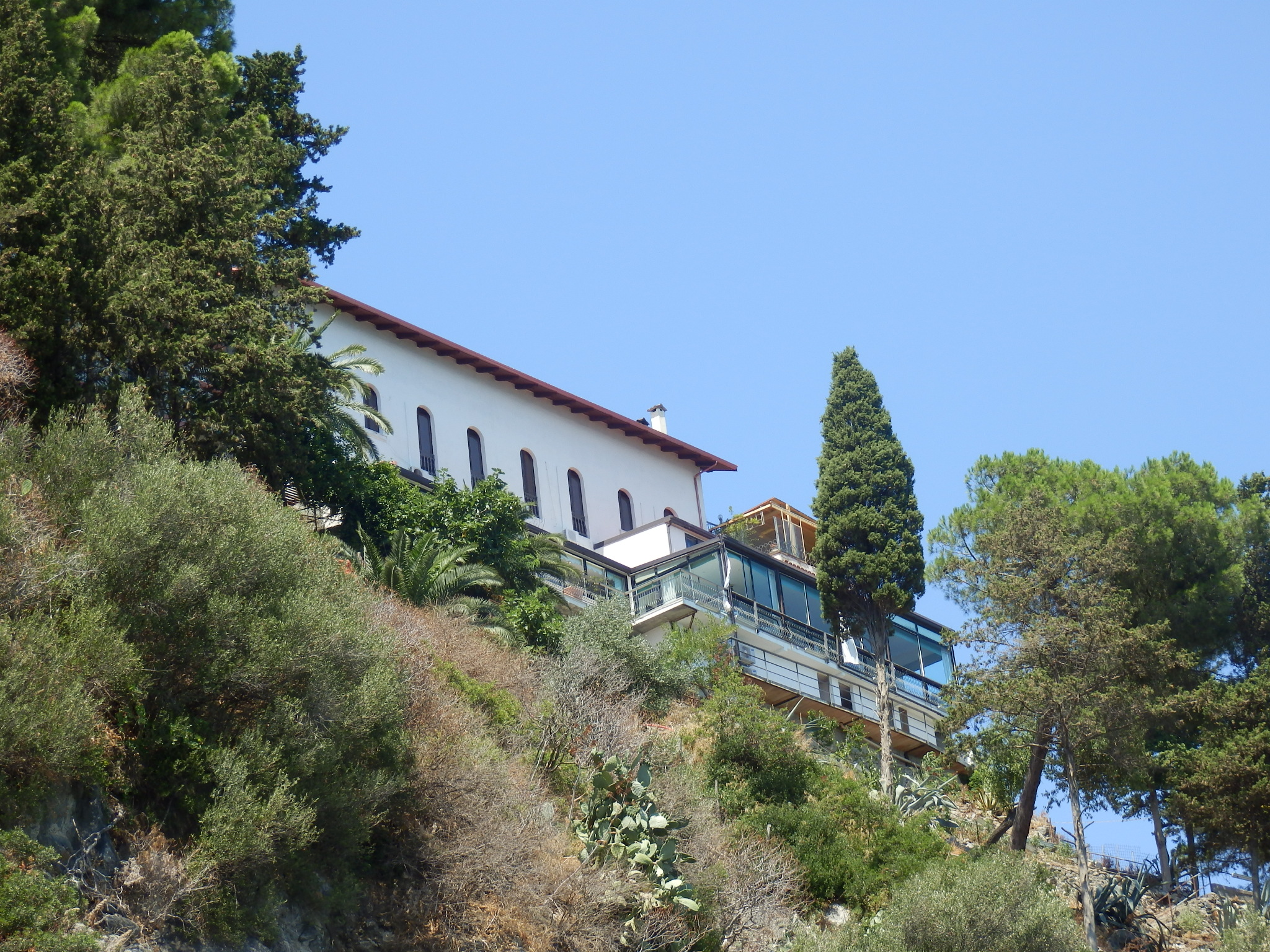 Restaurant Le Terrazze